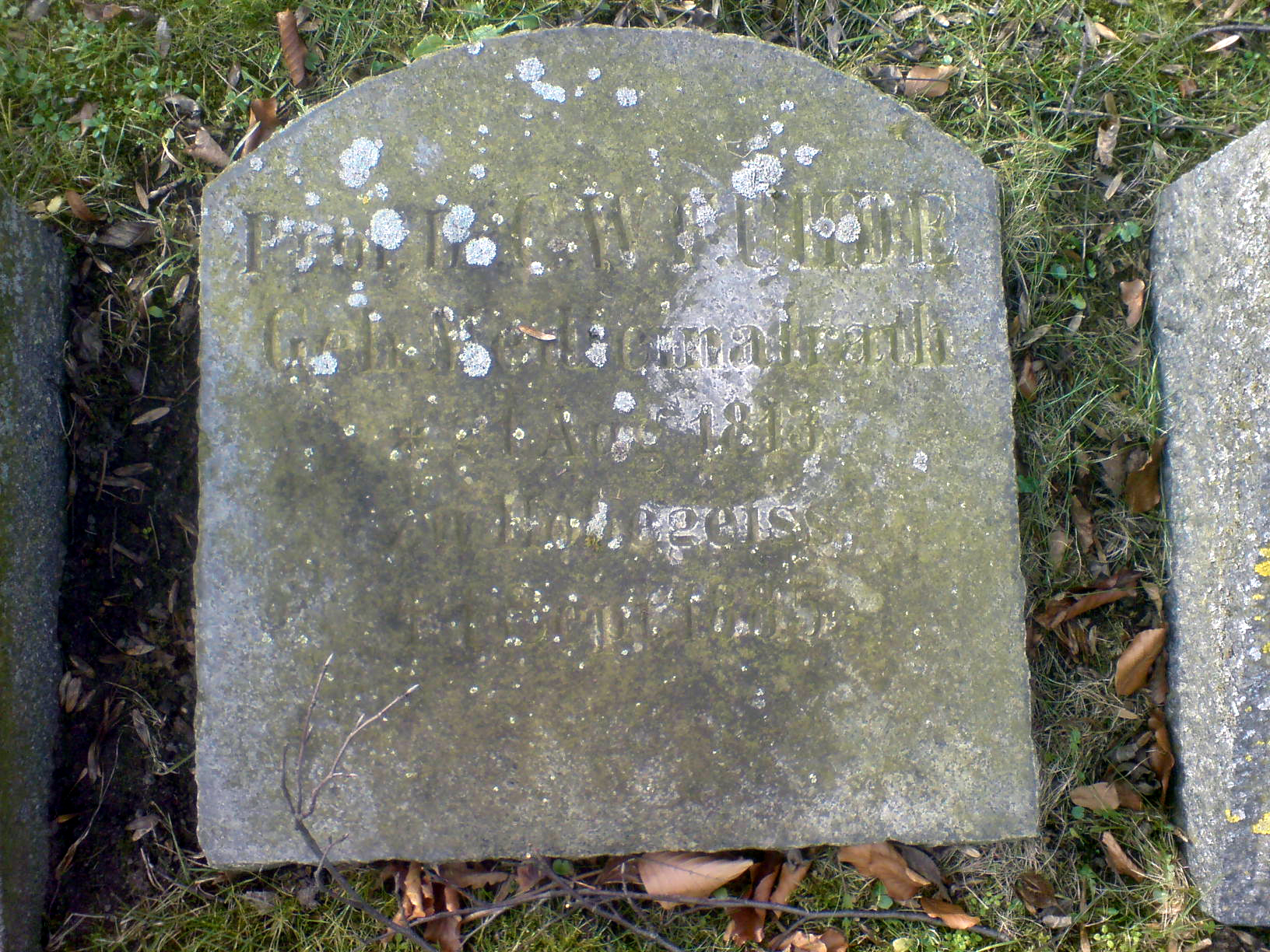 Grabinschrift: "Prof. Dr. C.W.F. Uhde, Geh. Medicinalrath, *21.Aug.1813, zu Hohegeiss, +1.Sept.1885". Foto aufgenommen auf dem Friedhof der Reformierten Gemeinde (Braunschweig, Juliusstrasse).